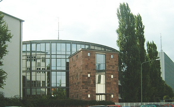 Rundbau des Hessischen Rundfunks mit Eingangsfoyer "Goldhalle", den Studios und Redaktionen von You FM und Hörspielstudios. Rechts im Bild: sog. ARD-Bau (Verwaltung und Sternpunkte der ARD (HF und FS)), fotografiert in der Bertramstraße; in den Fenstern spiegeln sich die gegenüberliegende Albertkirche und der weiter entfernte Sendemast der T-Com.